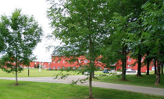 Planteforsk Tjøtta, Alstahaug, Nordland